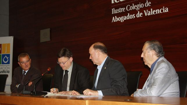 Ximo Puig, candidato socialista a la presidencia de la Generalitat, suscribe el pacto impulsado por la Sociedad Civil contra la Corrupción.